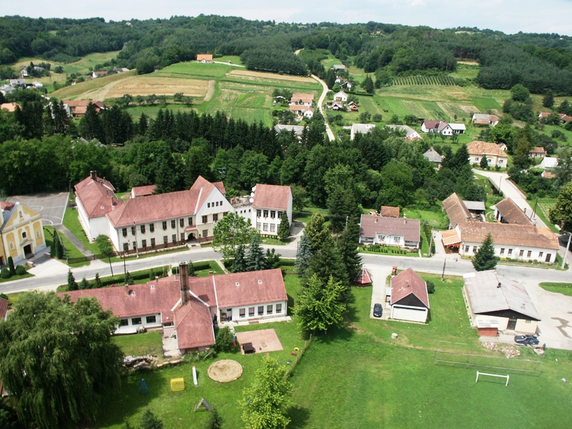 Felsőszölnök faluközpontja madártávlatból